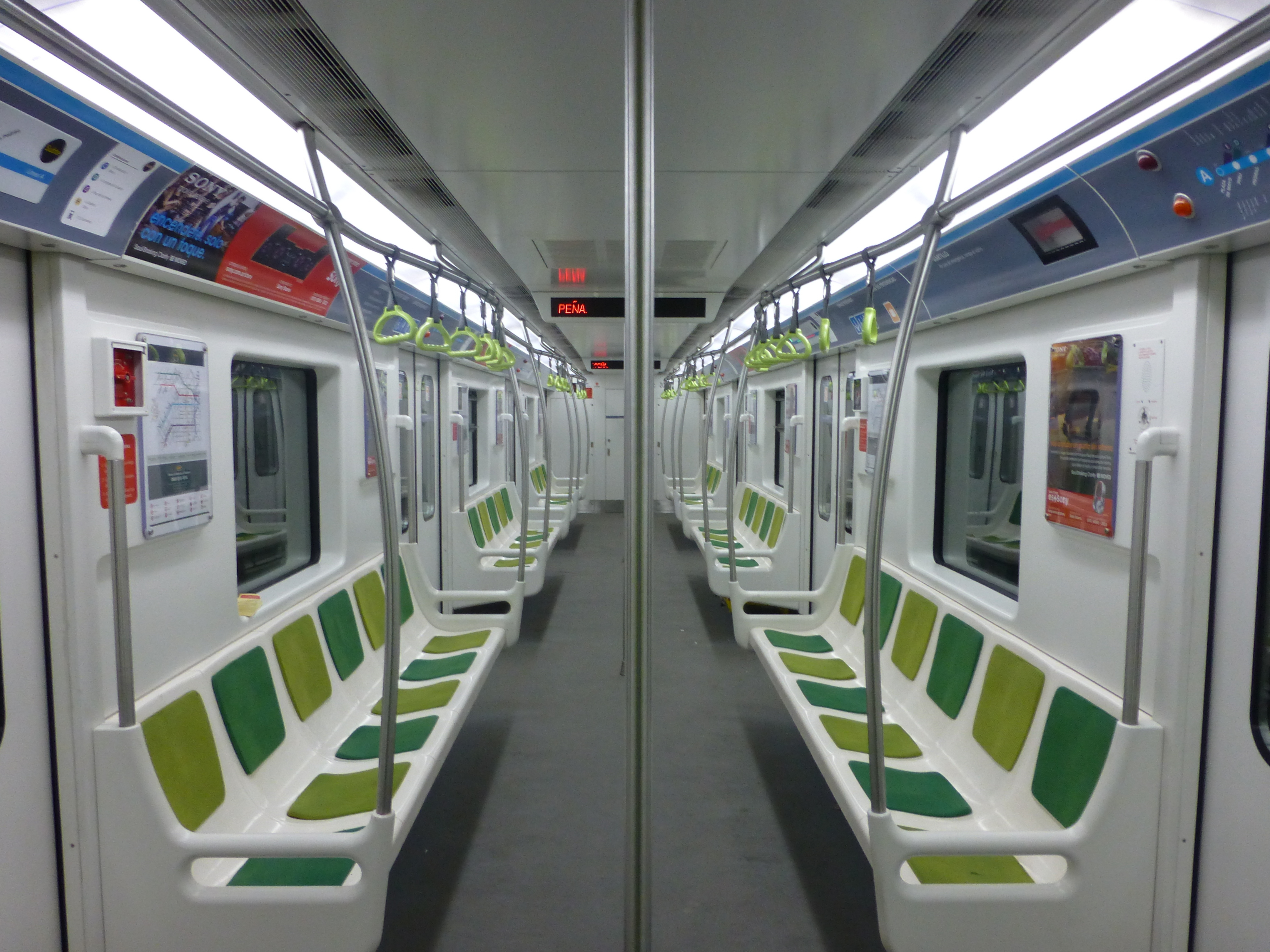 Coche CNR circulando por la línea A del subte de Buenos Aires.